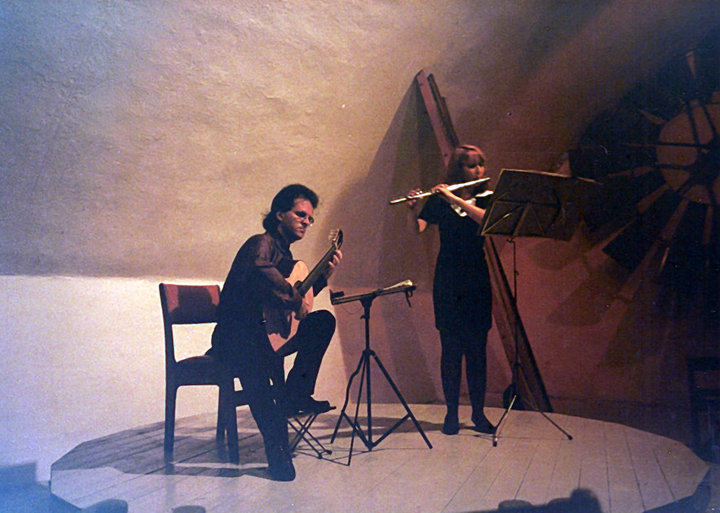 Diana López Moyal. Duo Caliz en La Habana